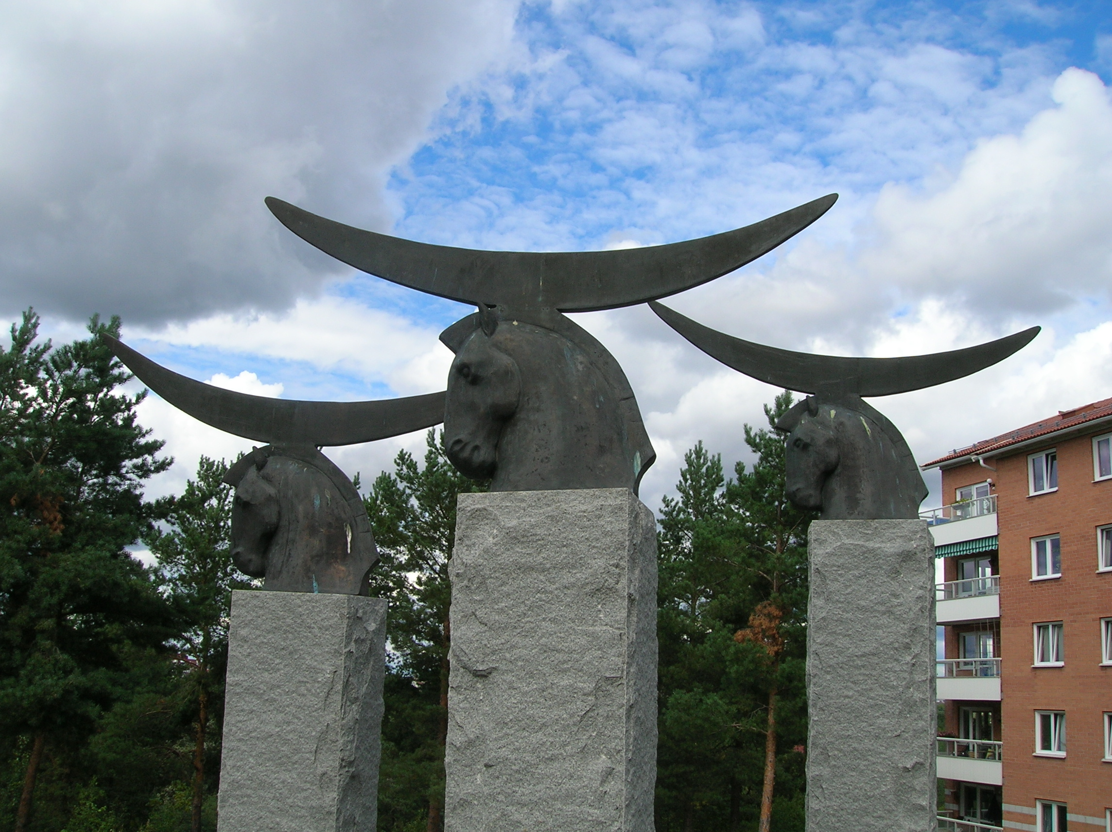 Vid Fastlagsvägen i Midsommarkransen, Stockholm står konstverket Månhästar av Camilla Bergman-Skoglund, uppfört 1991.